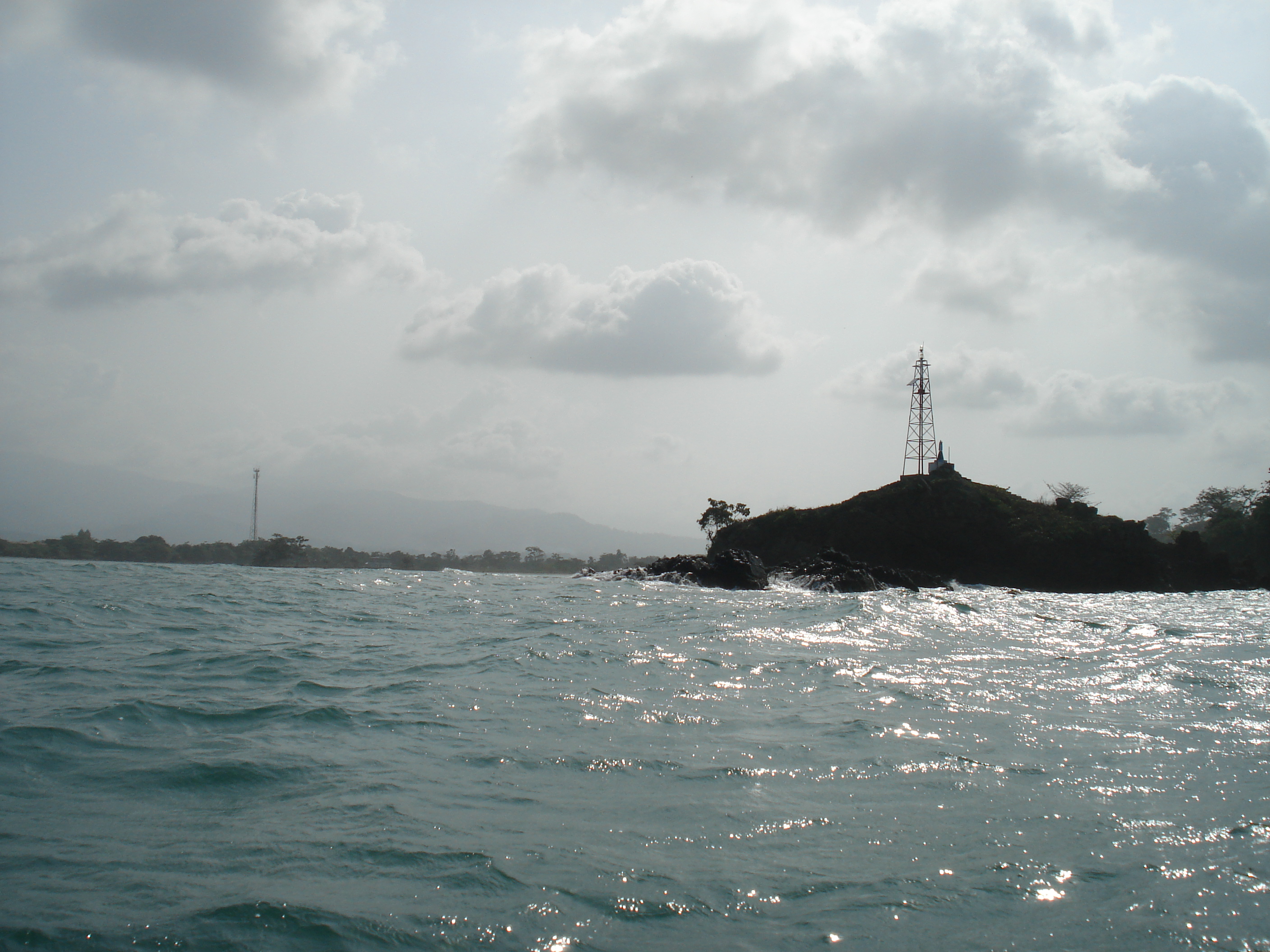 Acandí, desde panga en dirección de Turbo